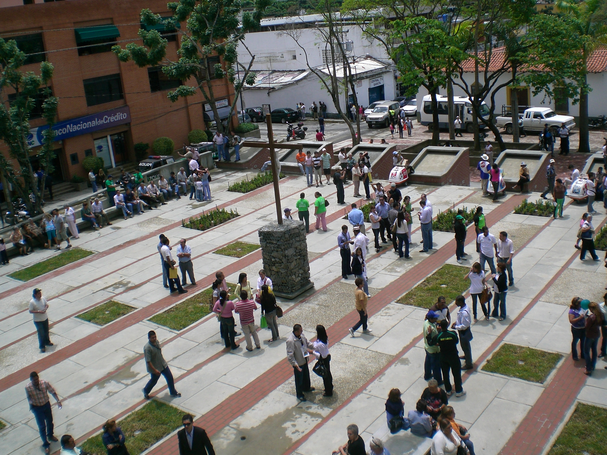 Plaza El Cristo, Nuestra Señora del Rosario de Baruta, Caracas.